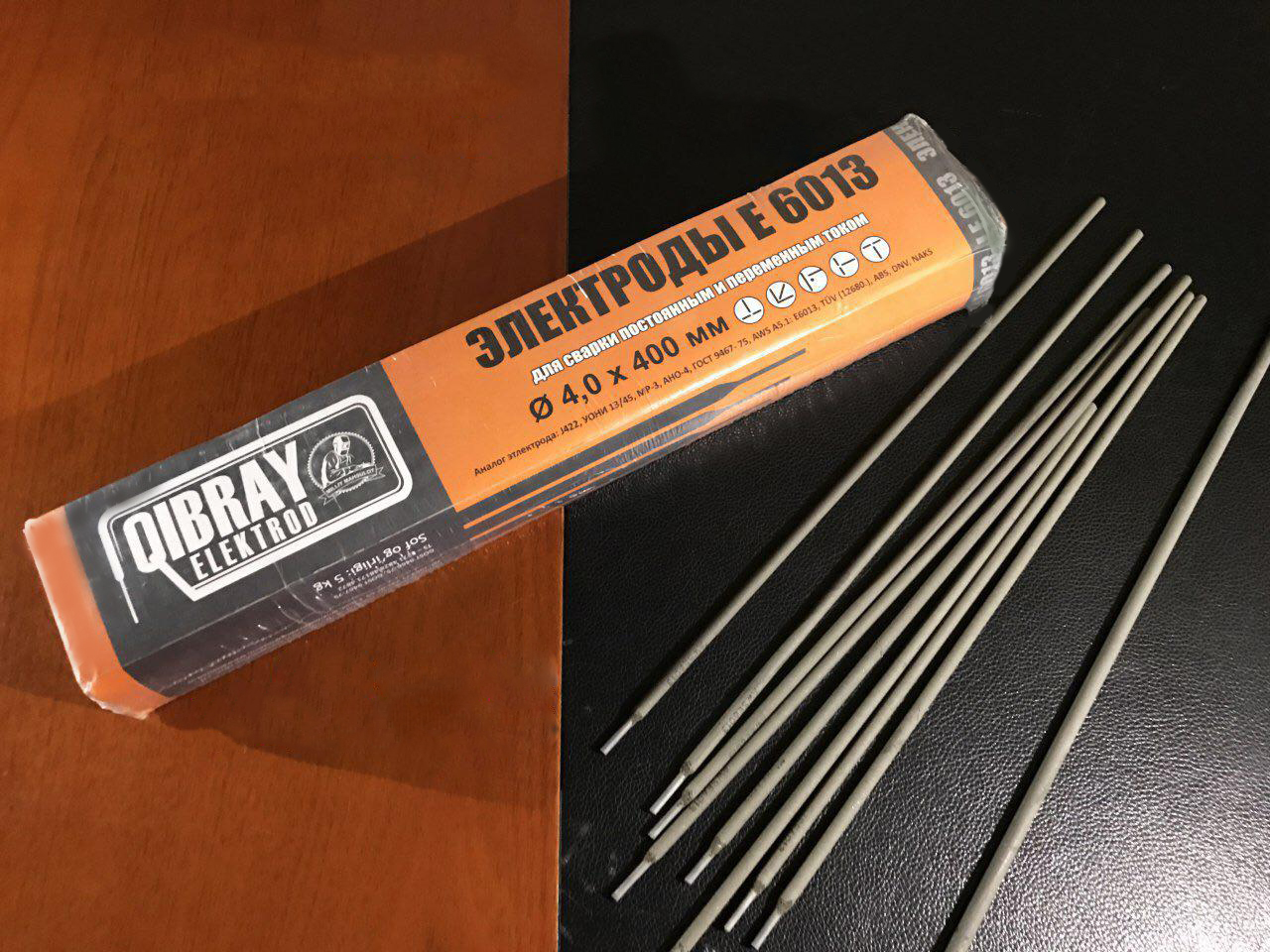 Oʻzbekcha/ўзбекча: Payvandlash uchun Elektrodlar